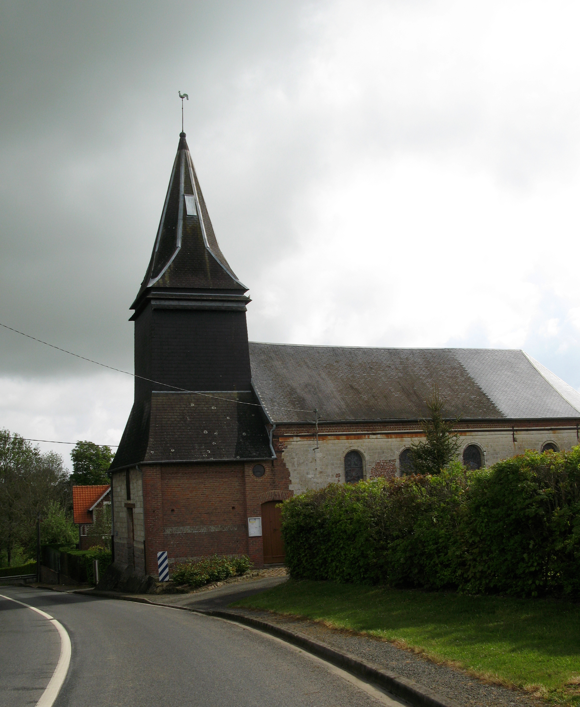 Pierregot (Somme, France) - L'église. .